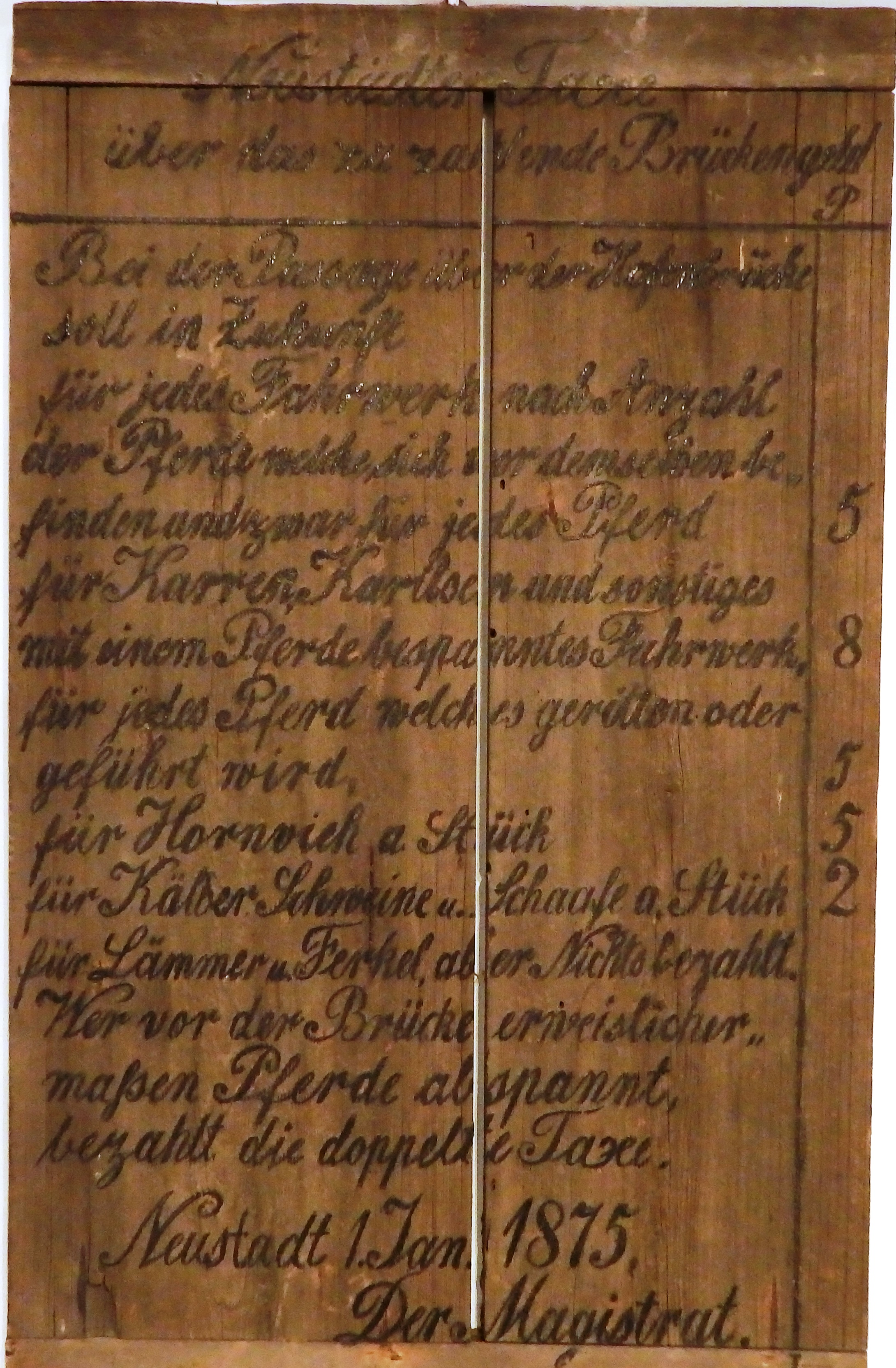 Brückengeld der Stadt Neustadt/Holstein, Holztafel, 1875, Museum zeiTTor, Neustadt/Holstein